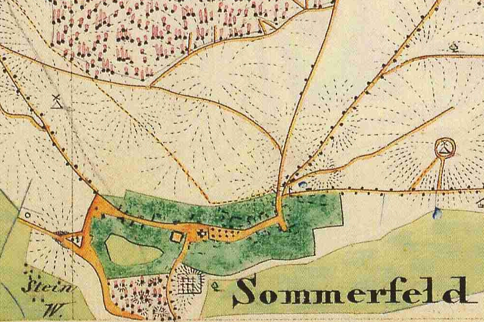 Karte von Sommerfeld, Kreis Osthavelland, Provinz Brandenburg, 1840